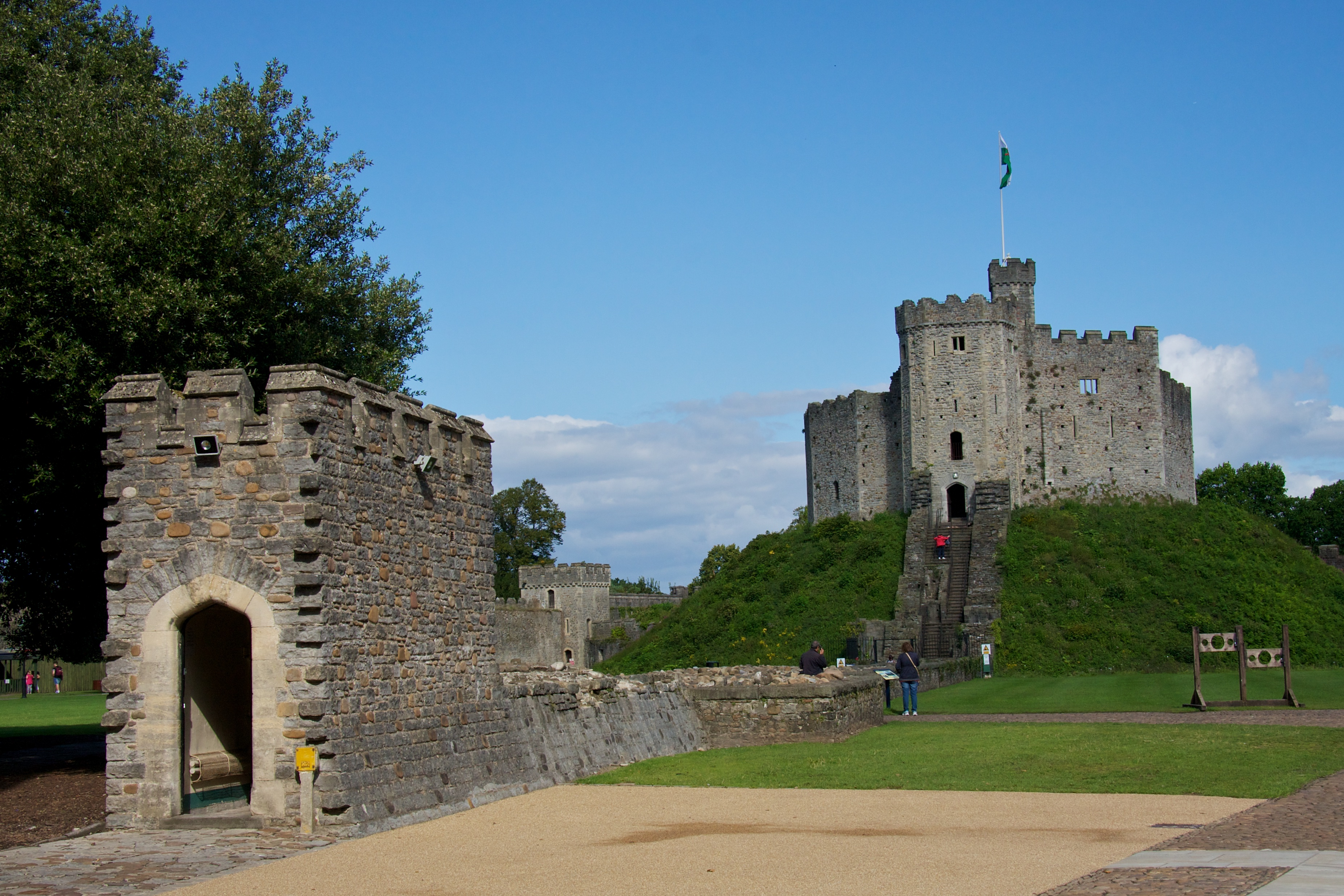 August 22, 2014